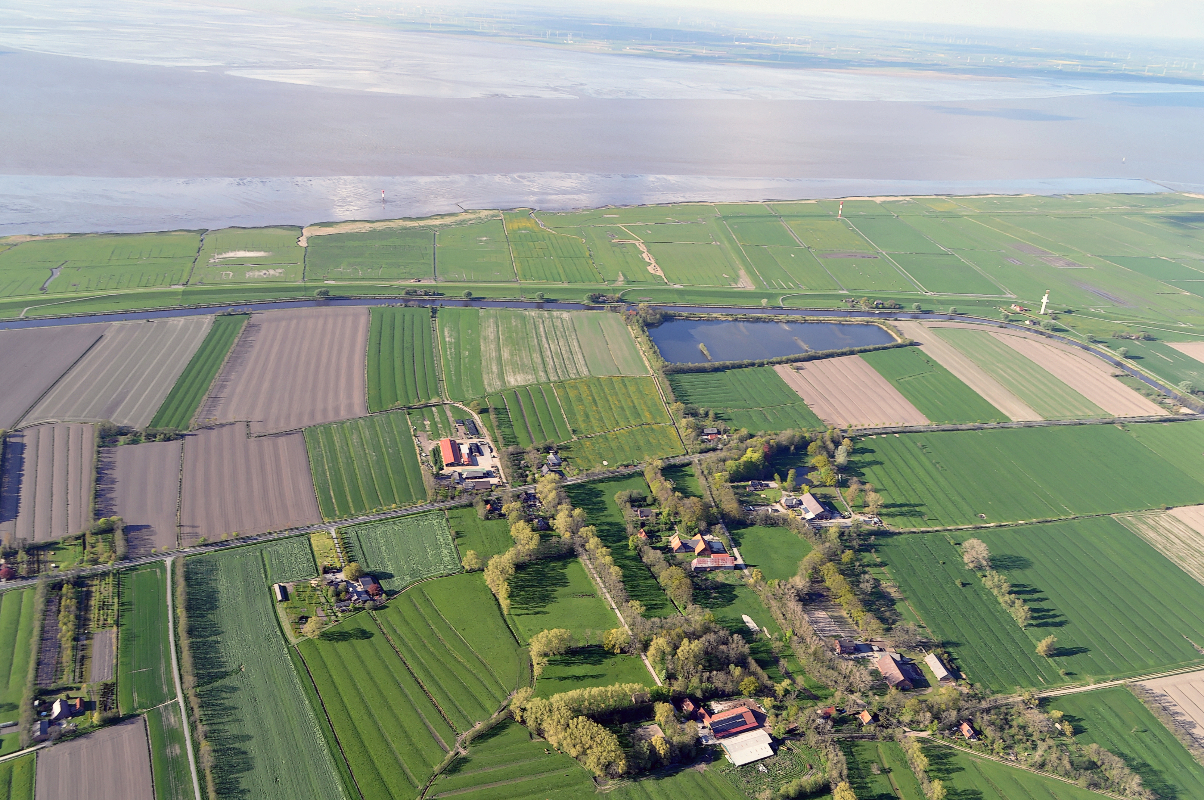 Luftbilder von der Nordseeküste 2012-05